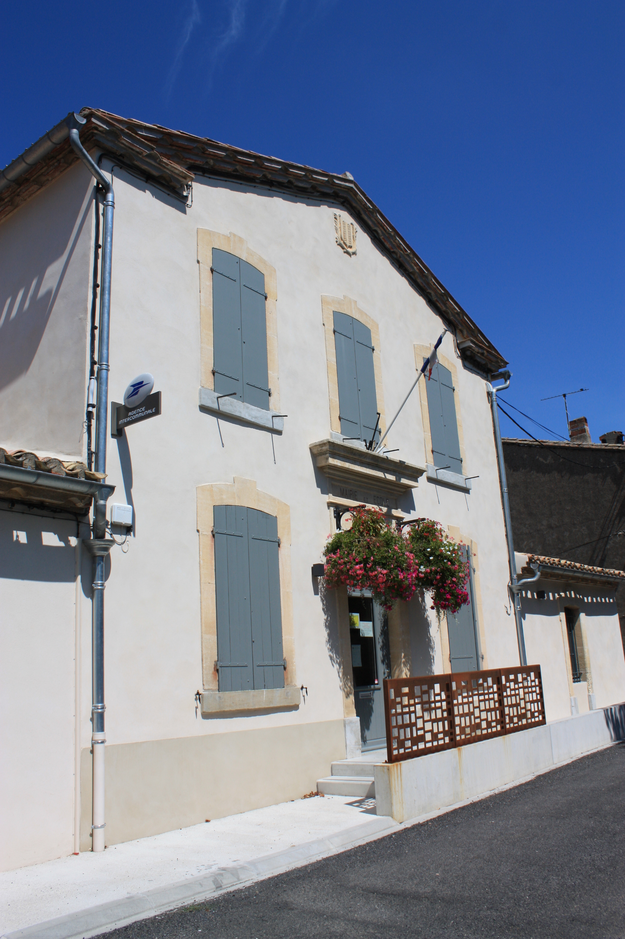 Mairie de Fontiès-d'Aude